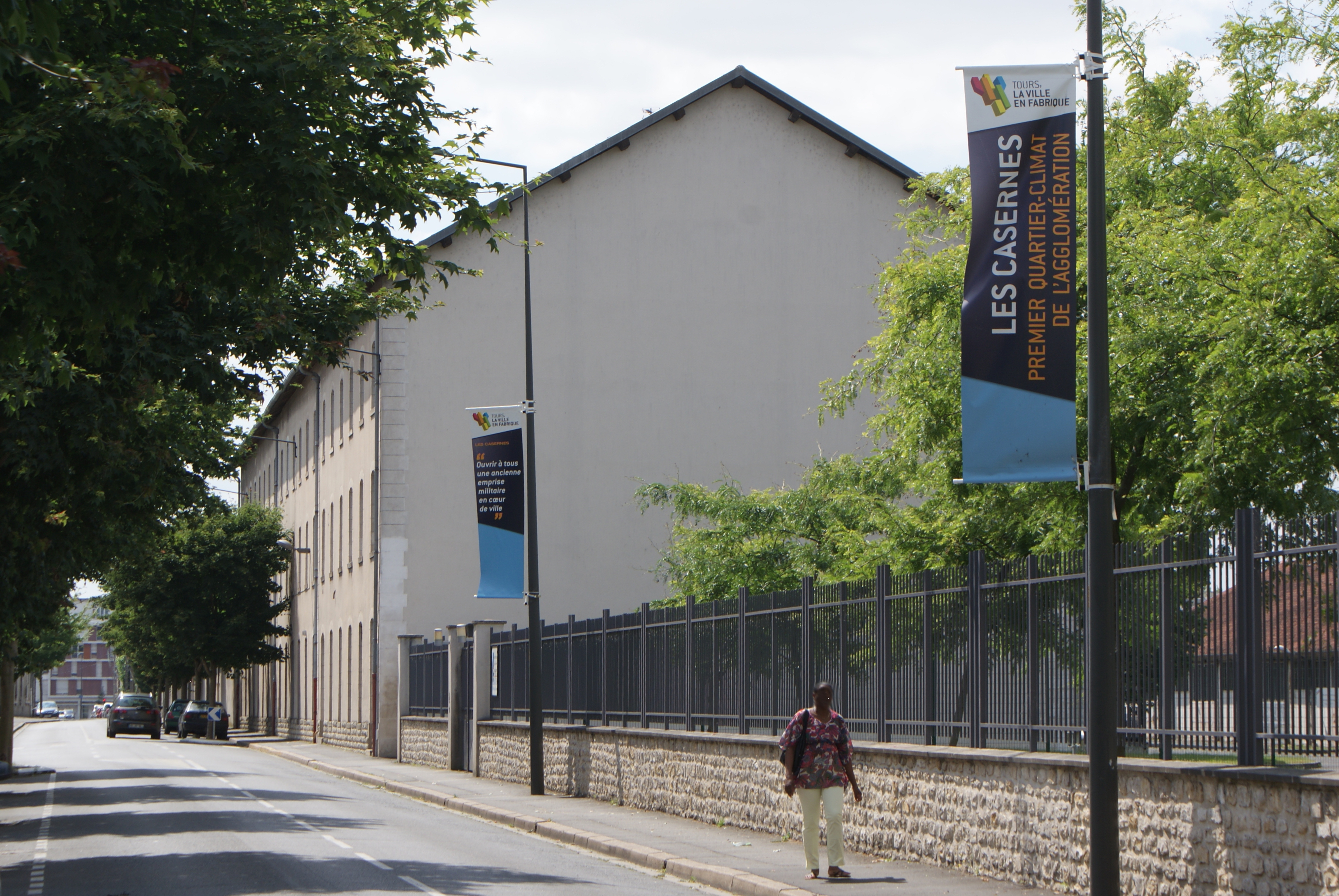 Tours : quartier Beaumont-Chauveau, anciennement militaire, en projet de réaménagement